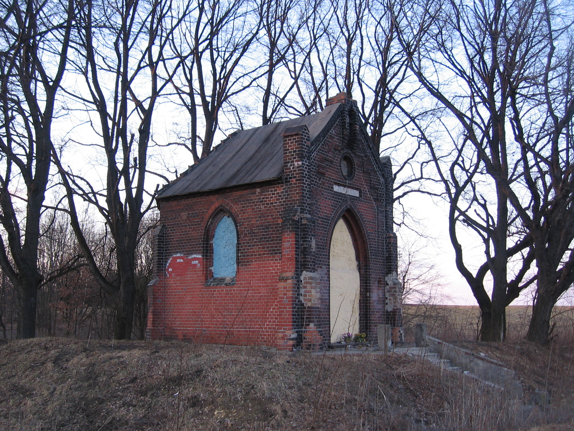 The Maria Hilf chapel from 1905 in Piekary Śląskie-Szarlej, project by Karl Mainka.